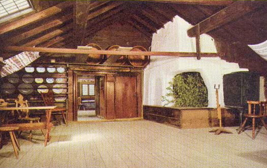 Kyrkhultstugan på Skansen, interiör